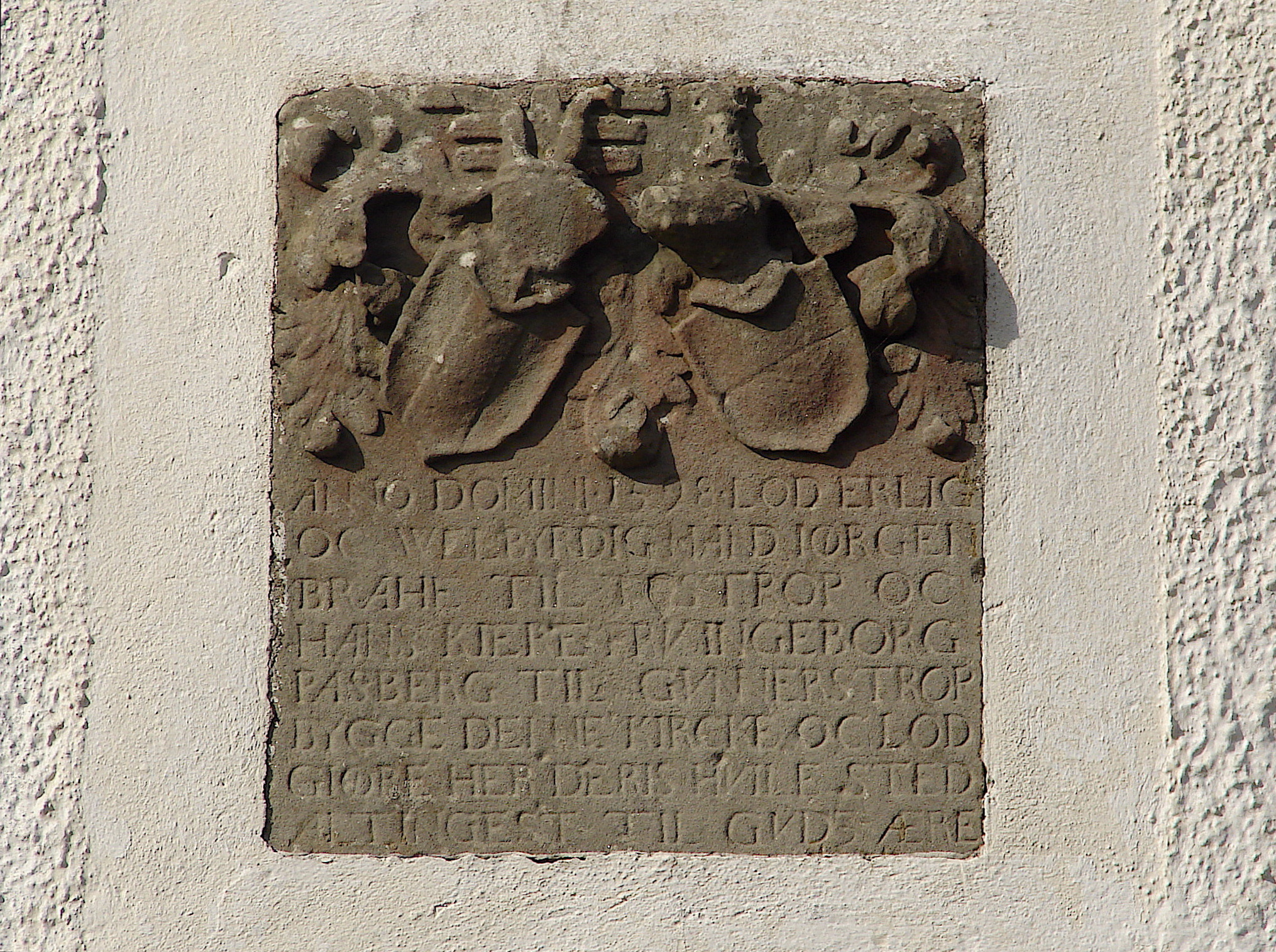 jørgen brahe til tostrop oc hans kiere fru ingeborg pasberg til gvnnerstrop bygge denne kiercke oc lod giøre her deris hvile sted alting est til gvds ære; relief på Tosterup kyrka, kirke, church